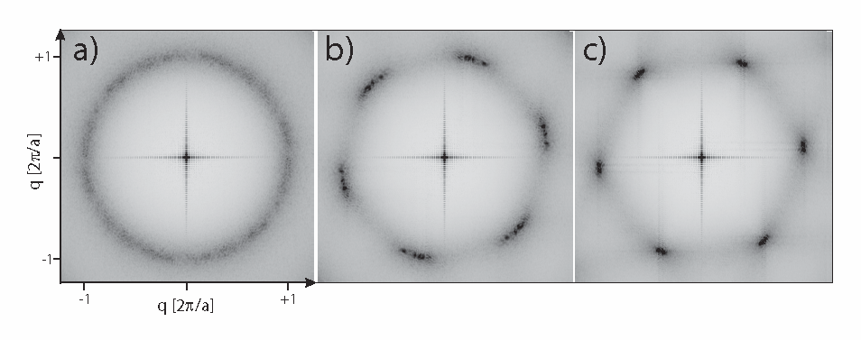 Strukturfaktor a) einer isotropen Flüssigkeit, b) der hexatischen Phase, c) eines Kristalls in zwei Dimensionen. Die 3 Phasen sind von der KTHNY-Theorie vorhergesagt, die Daten stammen aus einer kolloidalen Monolage